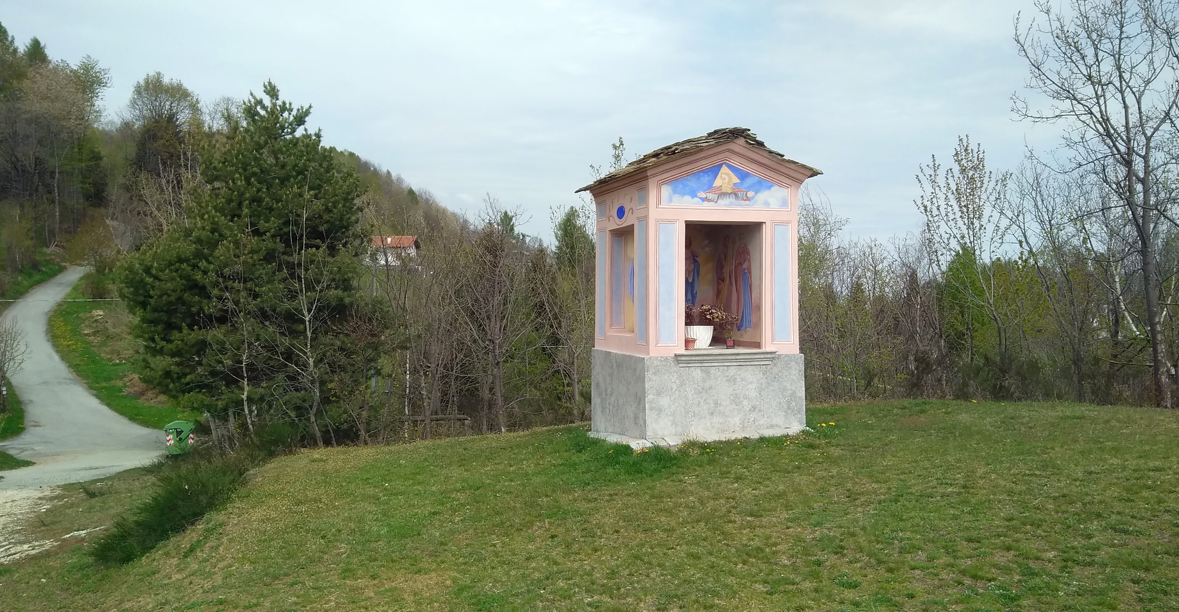 Santuario della Madonna di Peralba (Venasca): pilone votivo nei pressi della chiesa